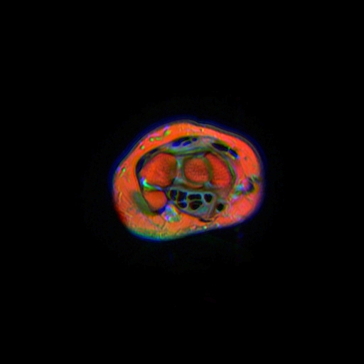 Wrist MRI